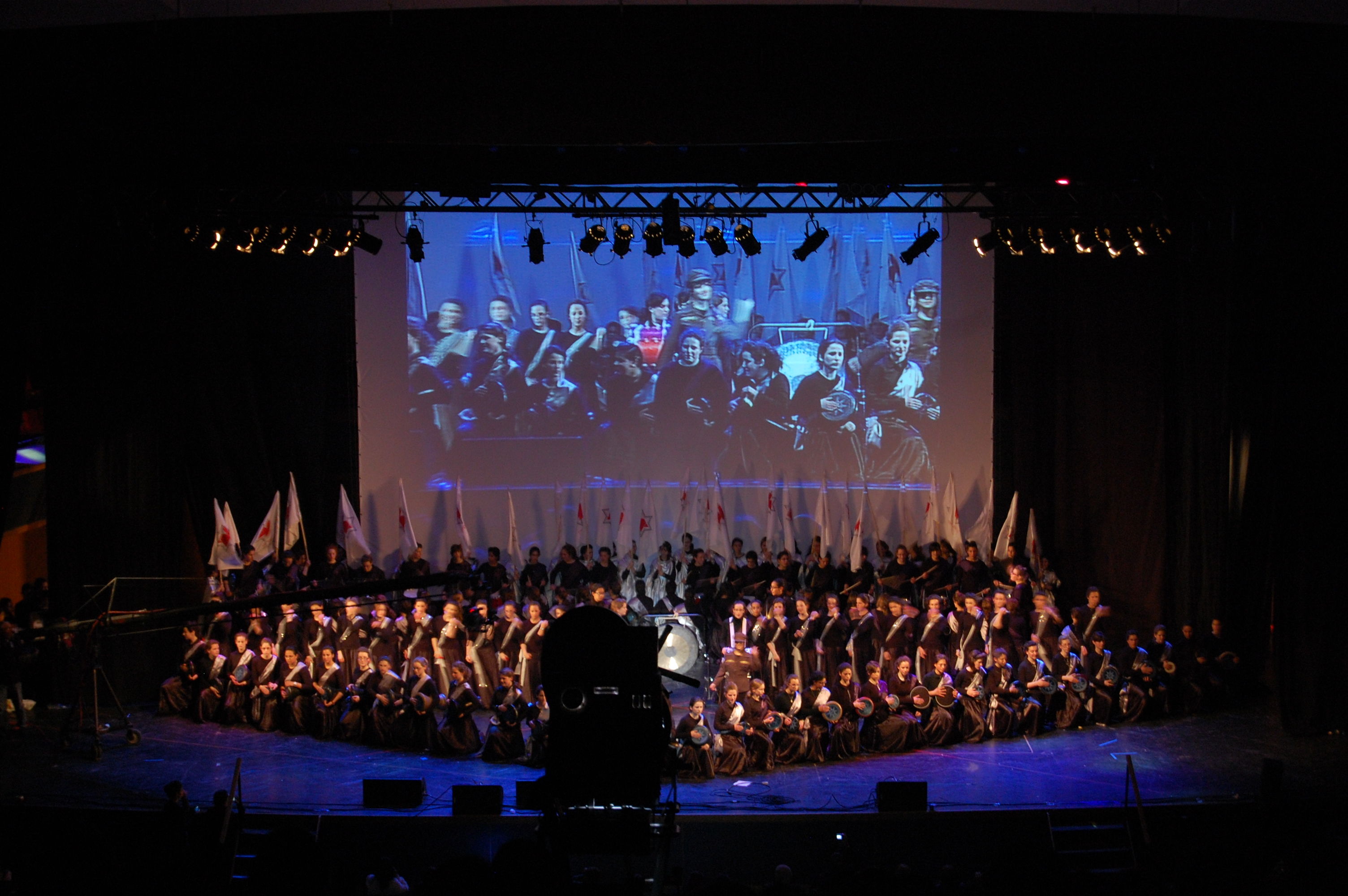 הופעה בבנייני האומה